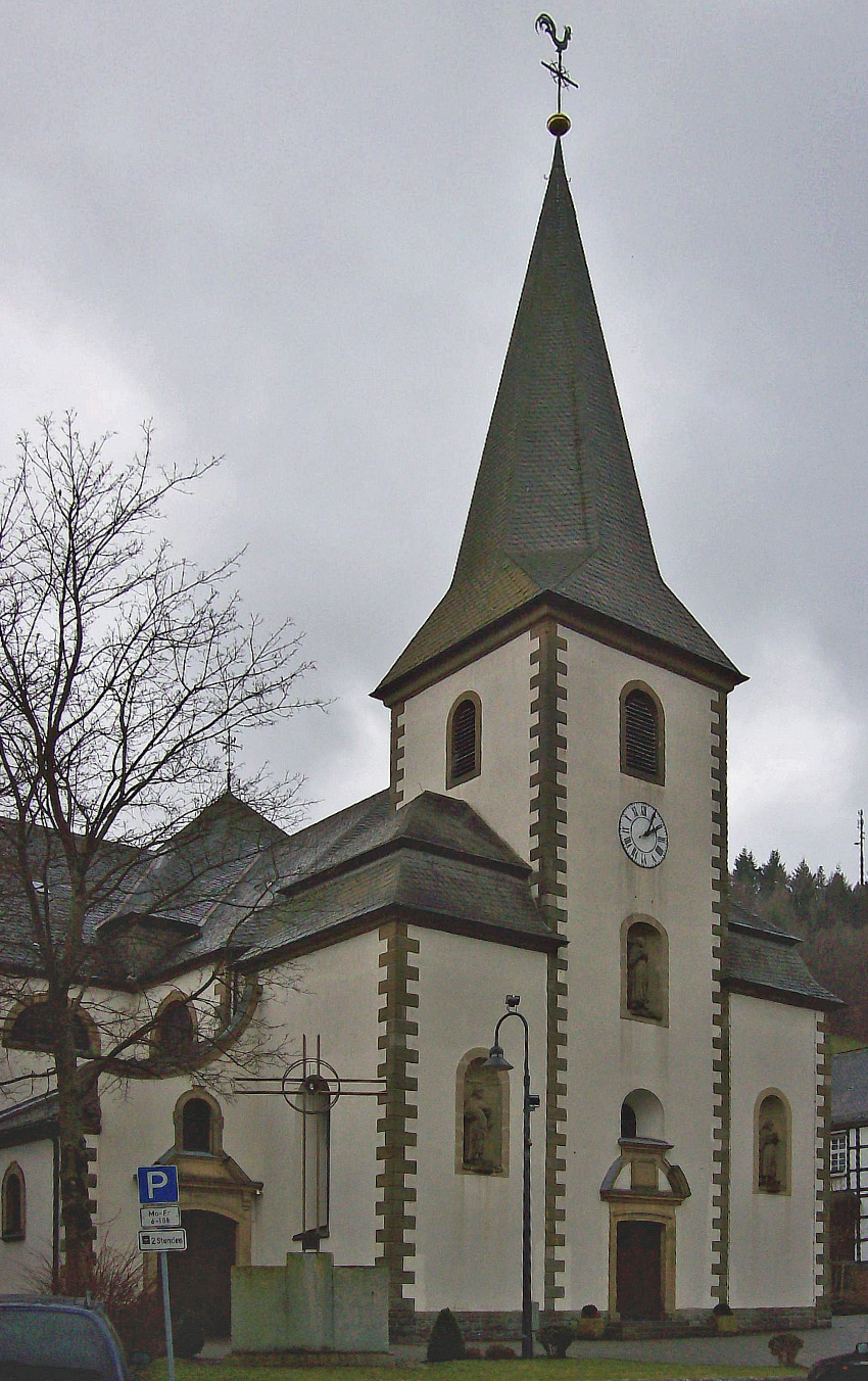 Kirche St.Cosmas und Damian in Schmallenberg-Bödefeld (Germany)